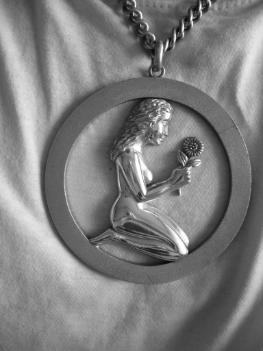 Zelfgenomen foto van maagdnl:hanger.